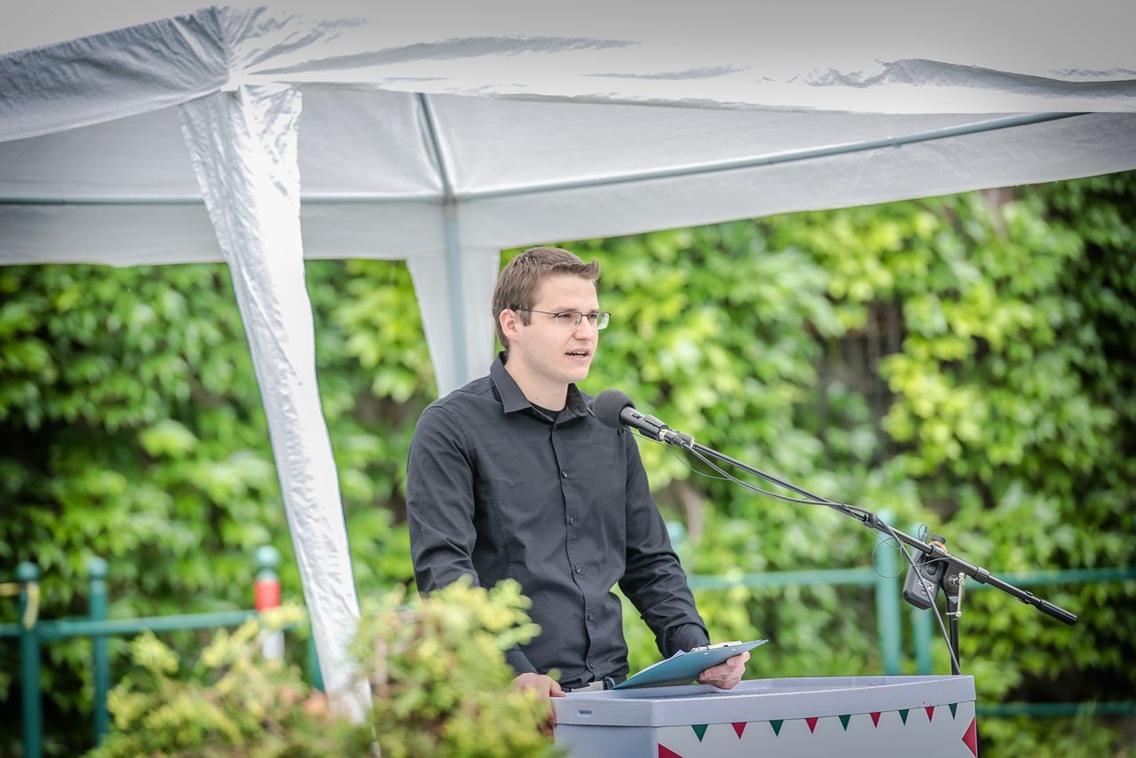 A Mi Hazánk Ifjai elnökeként mond beszédet A Nemzeti Légió zászlóbontásán Szegeden